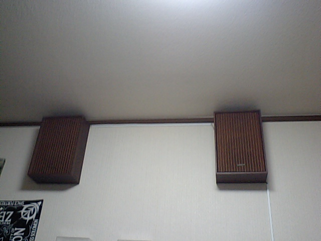 4チャンネスステレオ